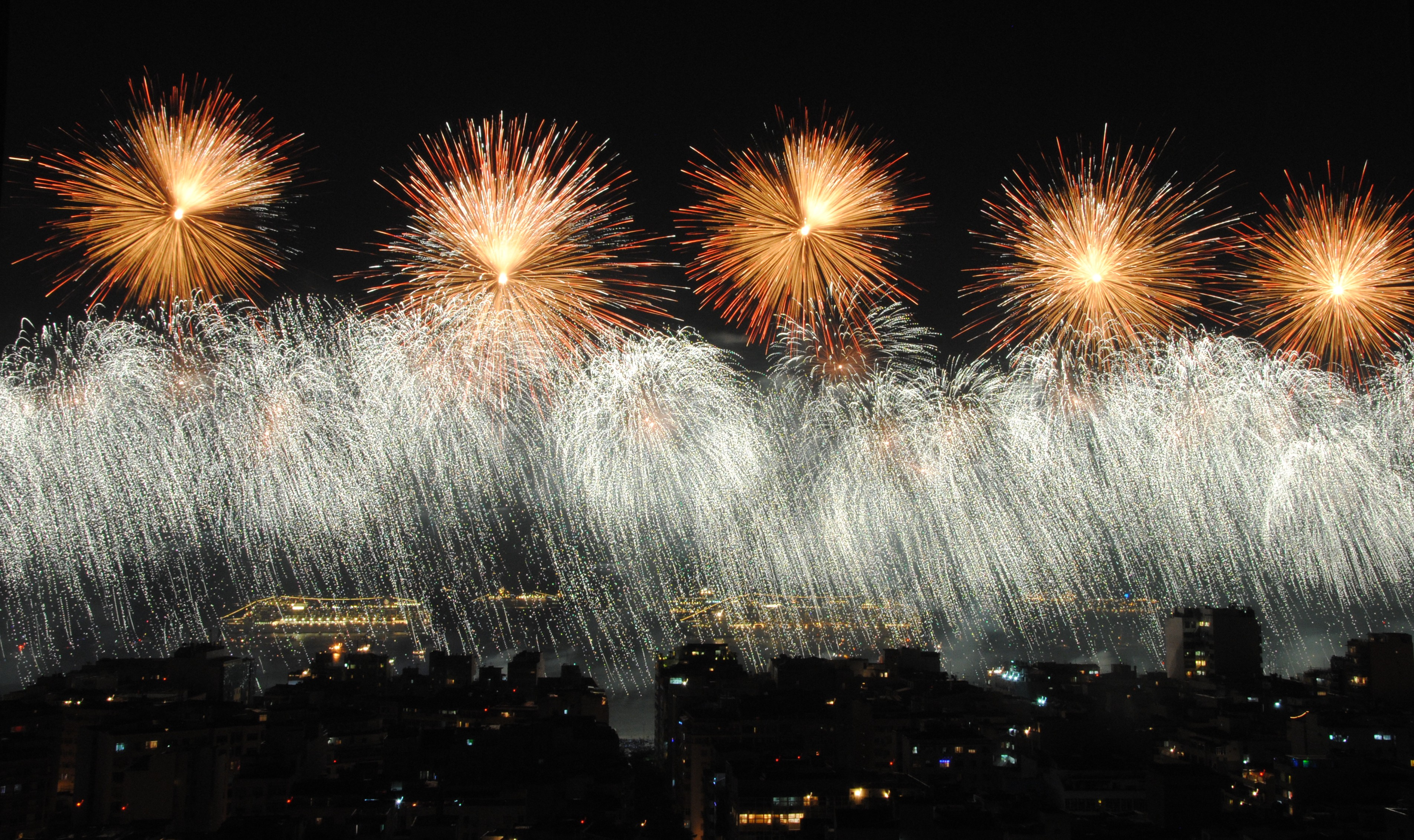 Rèveillon 2013 - Copacabana - Rio de Janeiro.